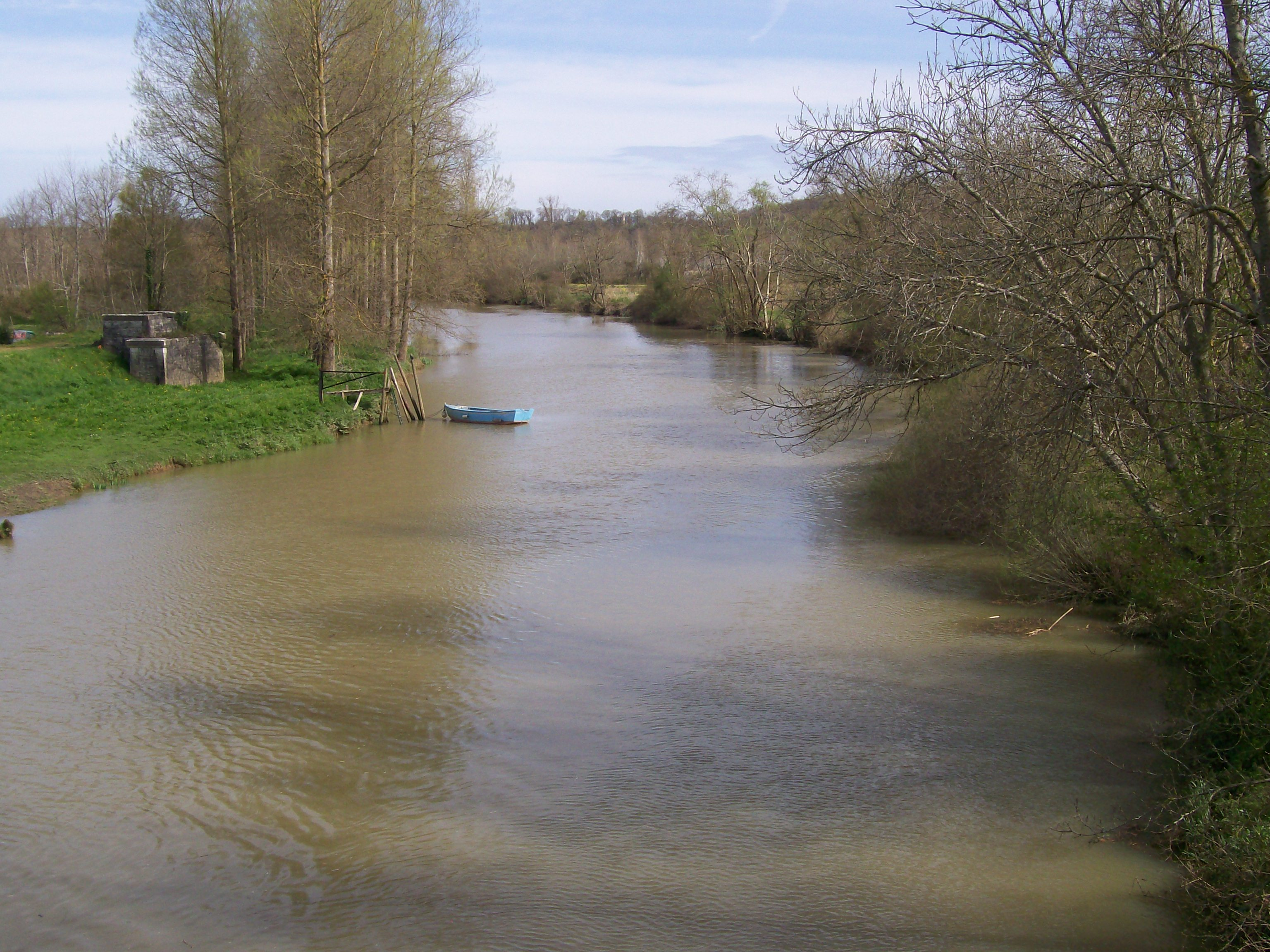 Biduze ibaia, Bidaxune ingurutik igarotzen